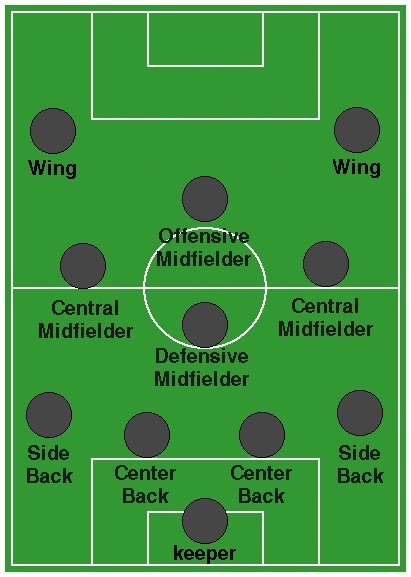 Position of 0 top